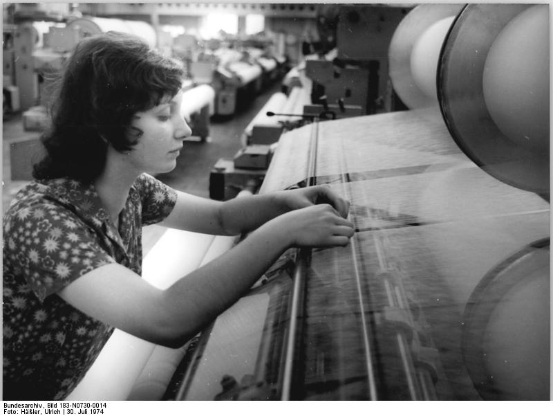 ADN-ZB-Häßler 30.7.74-ku-Bez. Dresden: An der modernen TEXTIMA-Kettwirkmaschine im VEB Lautex in Zittau arbeitet Evelyn Mättig. Im Jugendobjekt VIII. Parteitag qualifizierte sie sich zur Kettwirkerin. Durch Rationalisierung konnten die Werktätigen dieses Oberlausitzer Textilbetriebes alle Plan- und Gegenplanaufgaben des ersten Halbjahres übererfüllen. Den 200 Vertragspartnern konnten sie 3,3 Millionen qm Stoffe zusätzlich anbieten. (Vergl. hierzu N0730/13N)